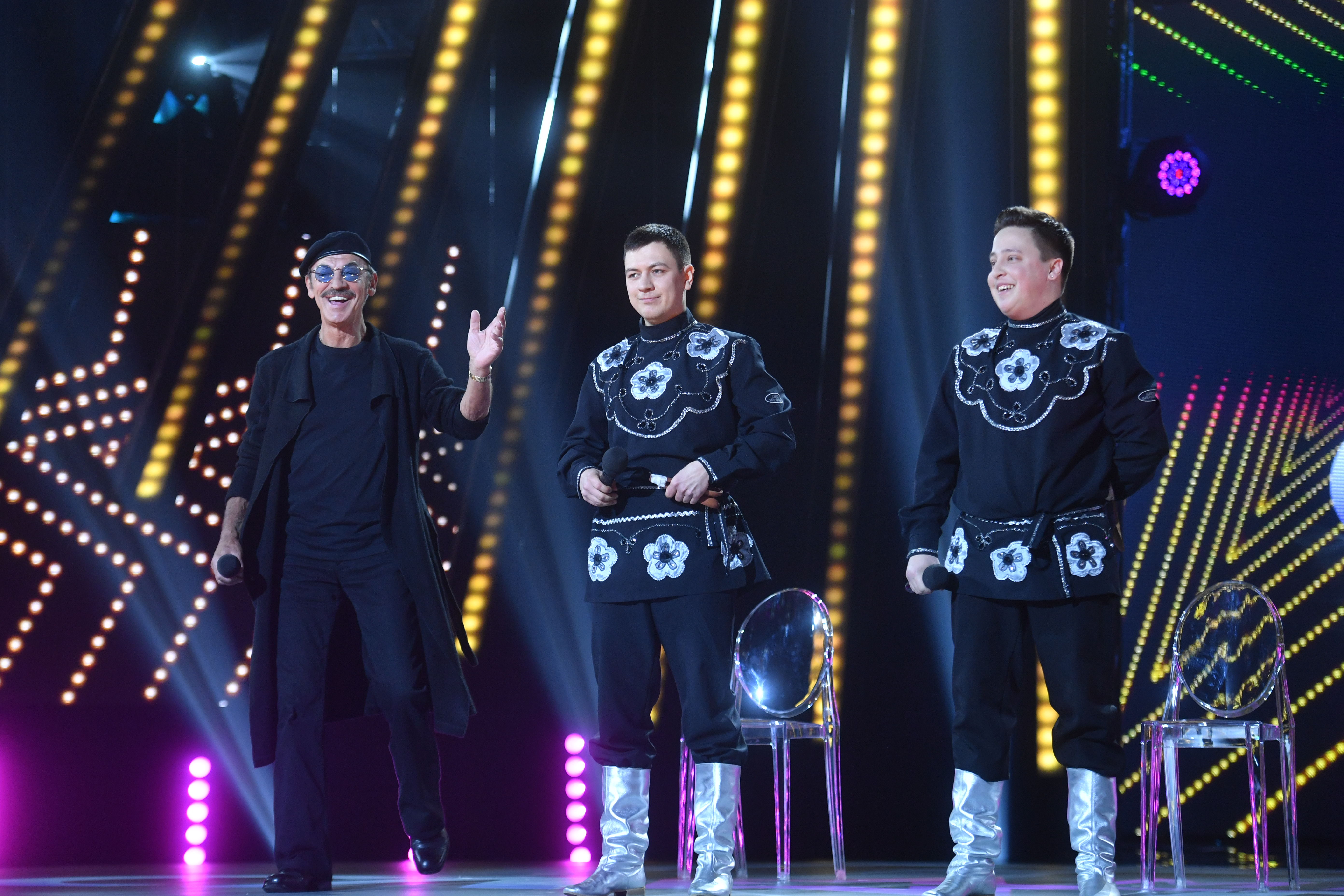 Участие в шоу на первом канале